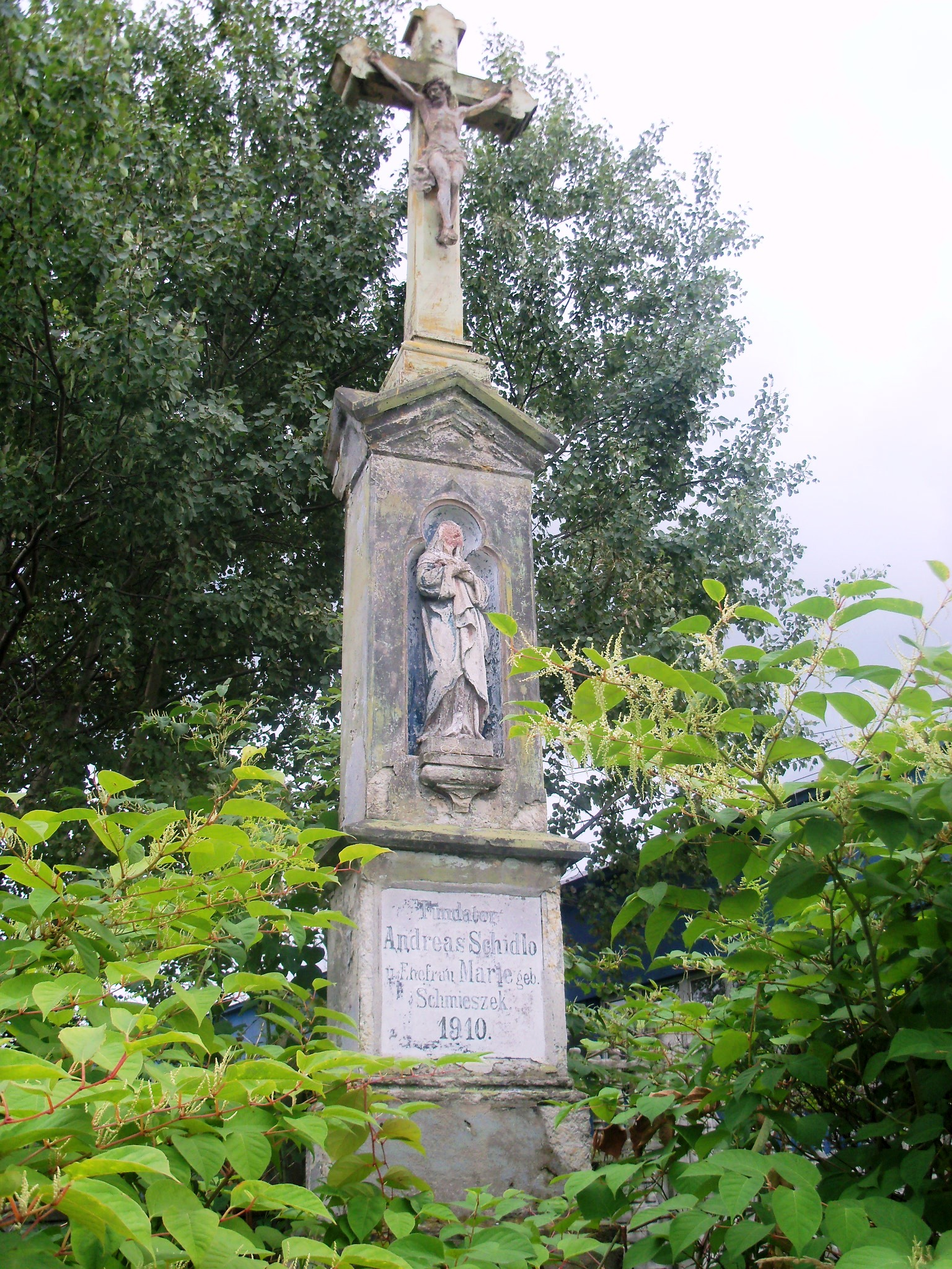 Katowice-Dąbrówka Mała: Ulica Siemianowicka w Pniakach - figura z 1910 roku